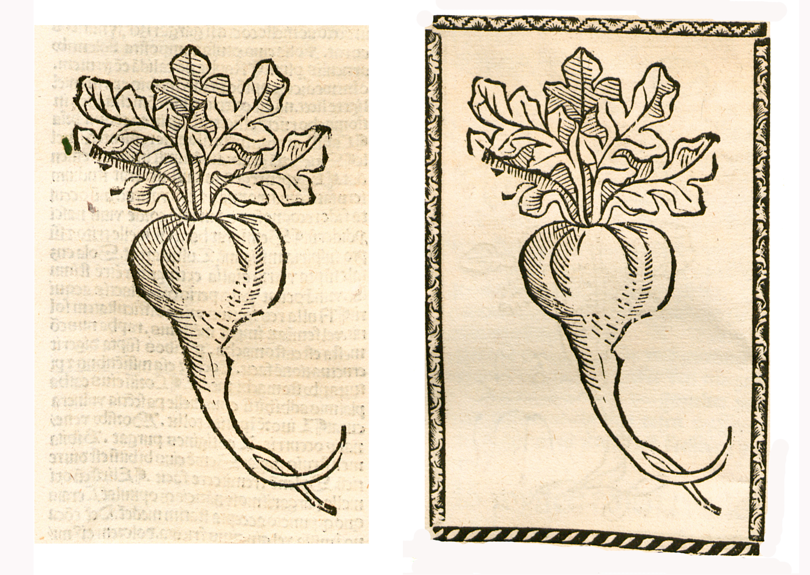 Abbildung von: Ruben (Brassica rapa)